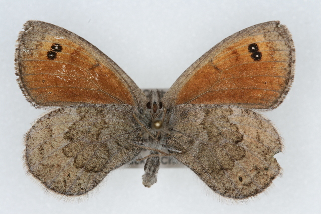 Erebia callias underside Sample ID: CSU-CPG-LEP001891